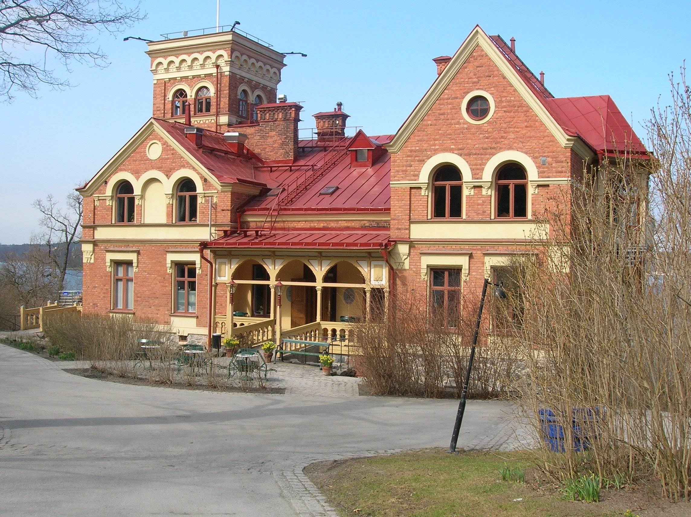 Tornvillan i Nacka strand, Nacka kommun